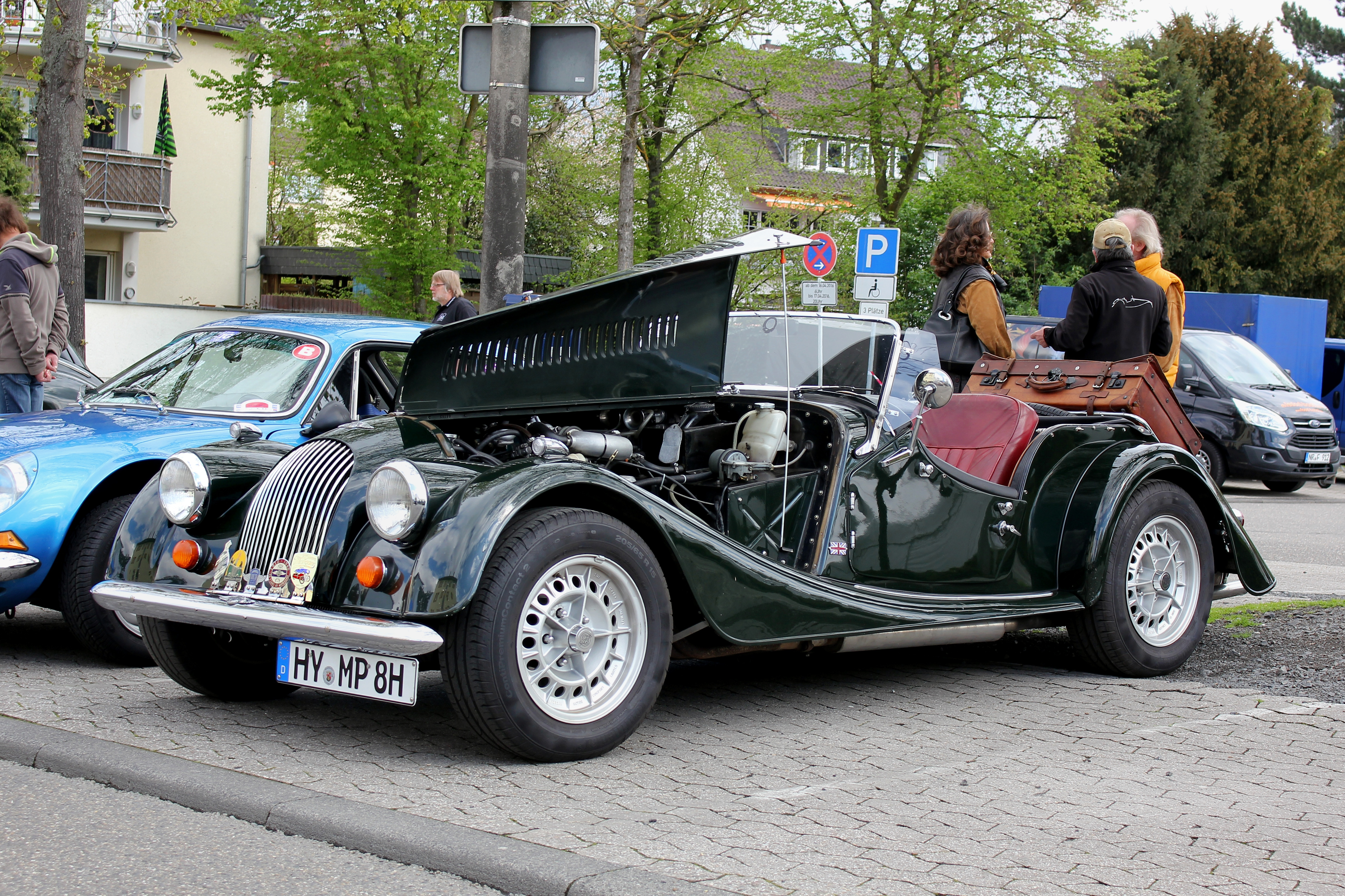 Morgan Plus 8, Baujahr 1984, fiktives Kennzeichen